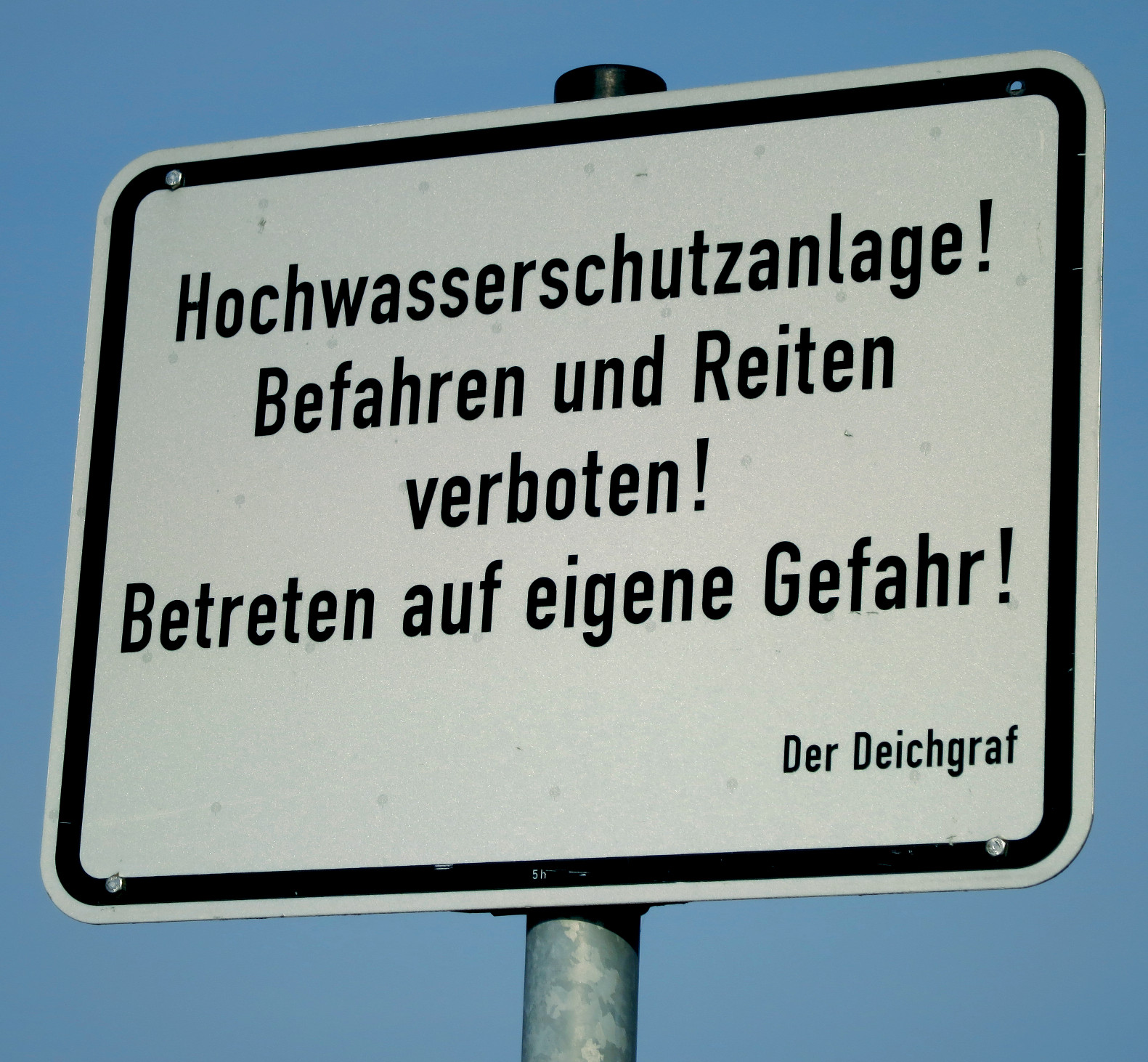 Schild der Behörde Deichgraf am Stördeich in Wittenbergen, Kreis Steinburg